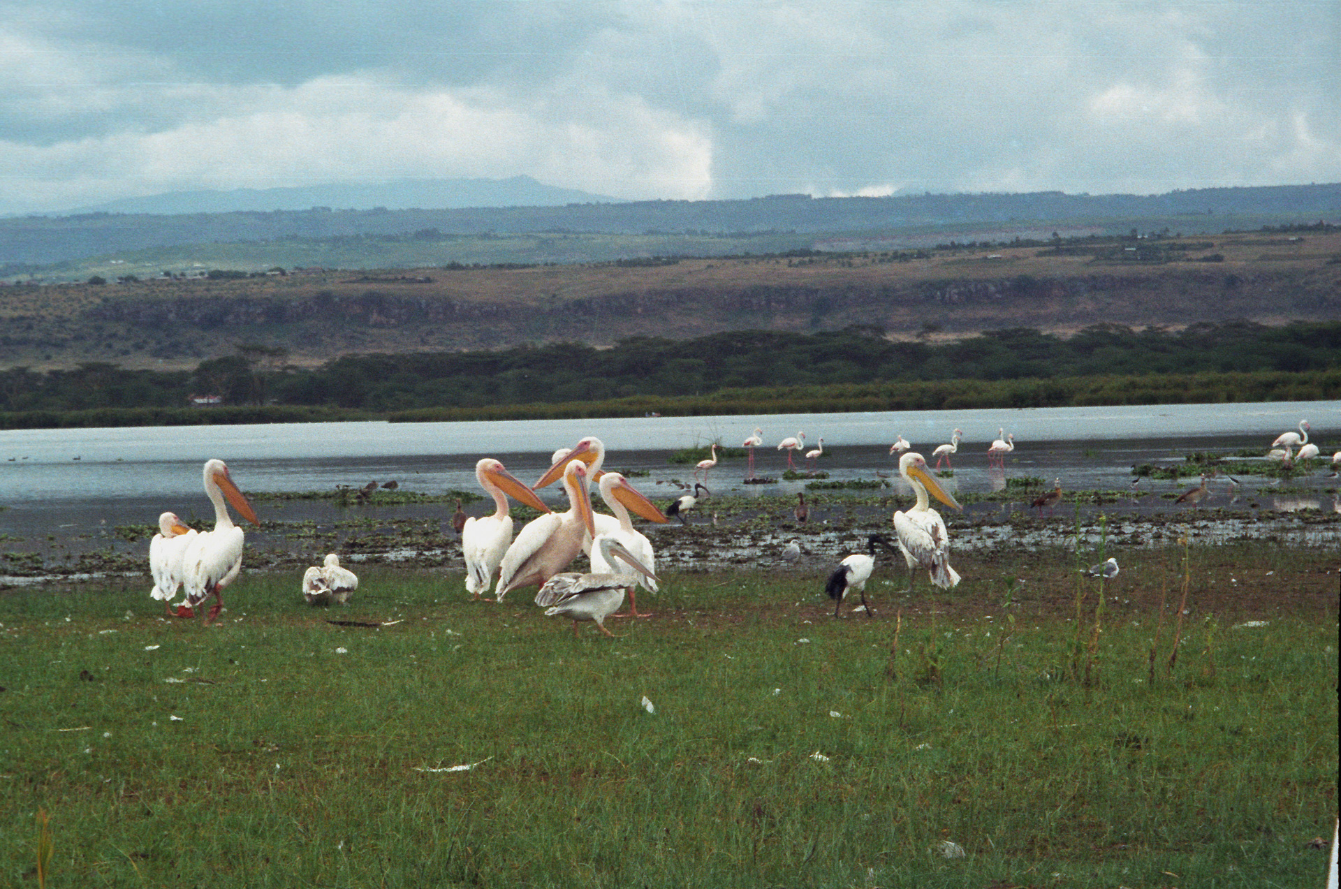 Pelicans, Naivasha Lake, Kenya